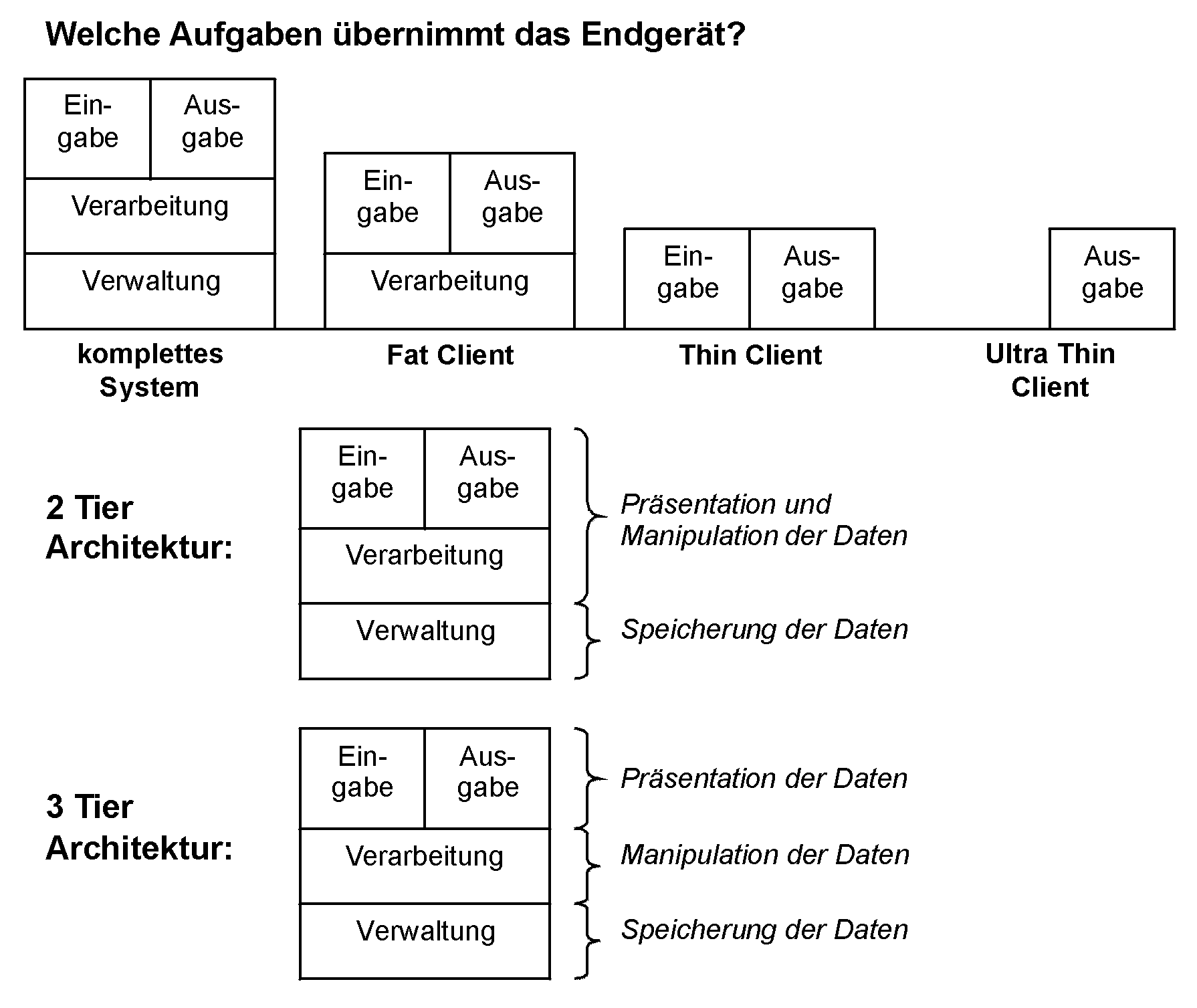 Tier Architekturen